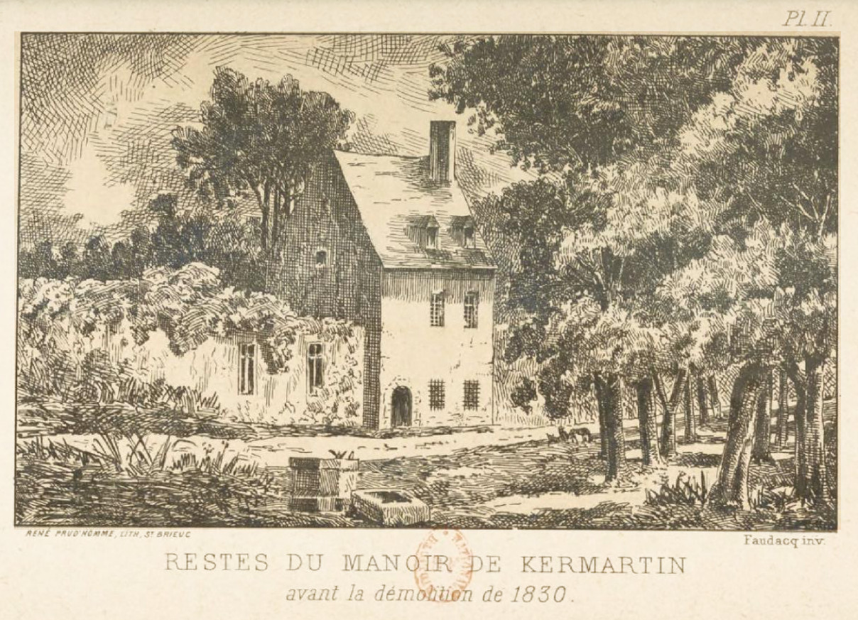 Manoir de Kermartin en 1830